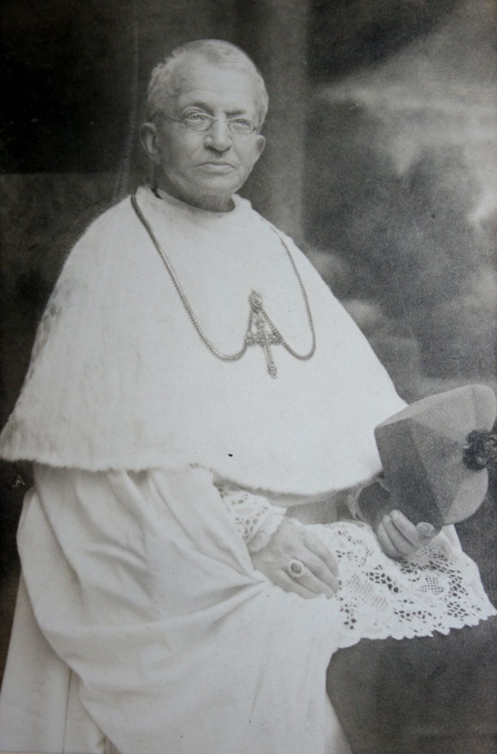 Amadeus de Bie (1844-1920), Generalabt des Zisterzienserordens